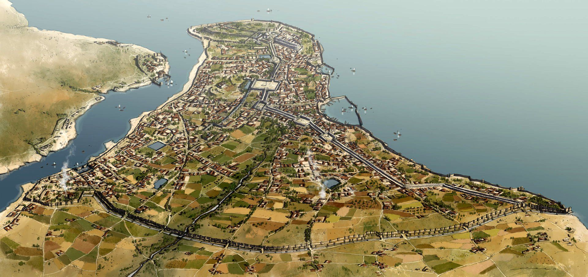 Mapa de la Constantinopla bizantina.